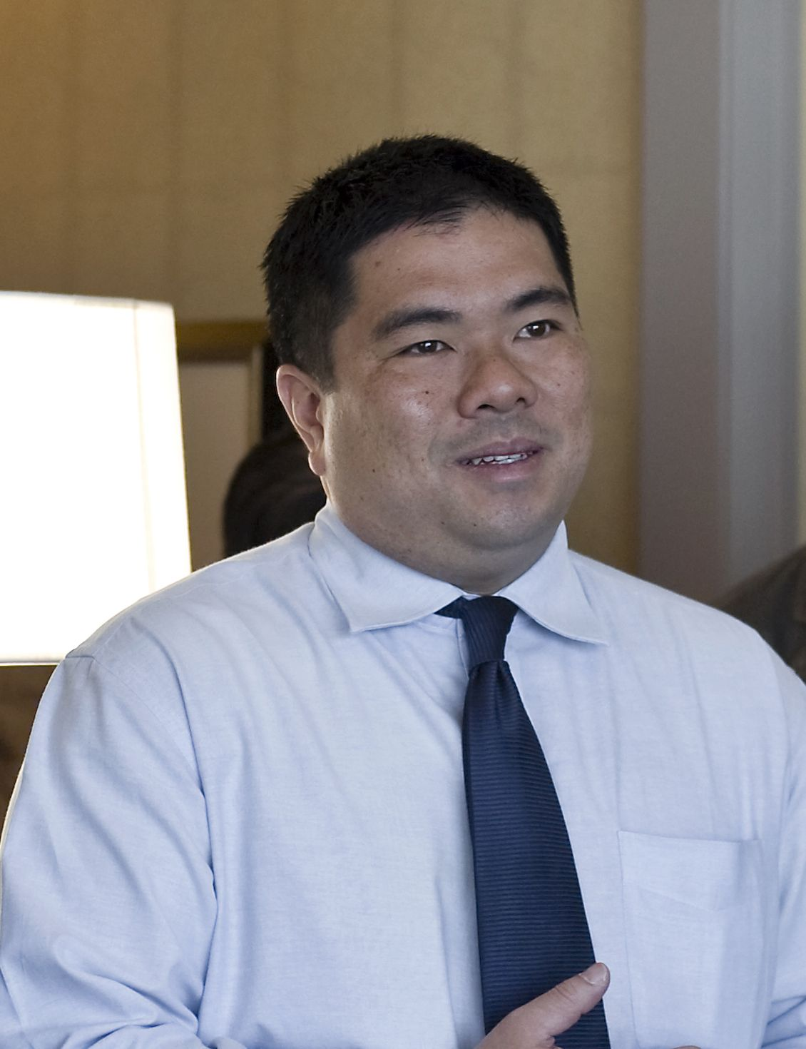 อิสรา สุนทรวัฒน์